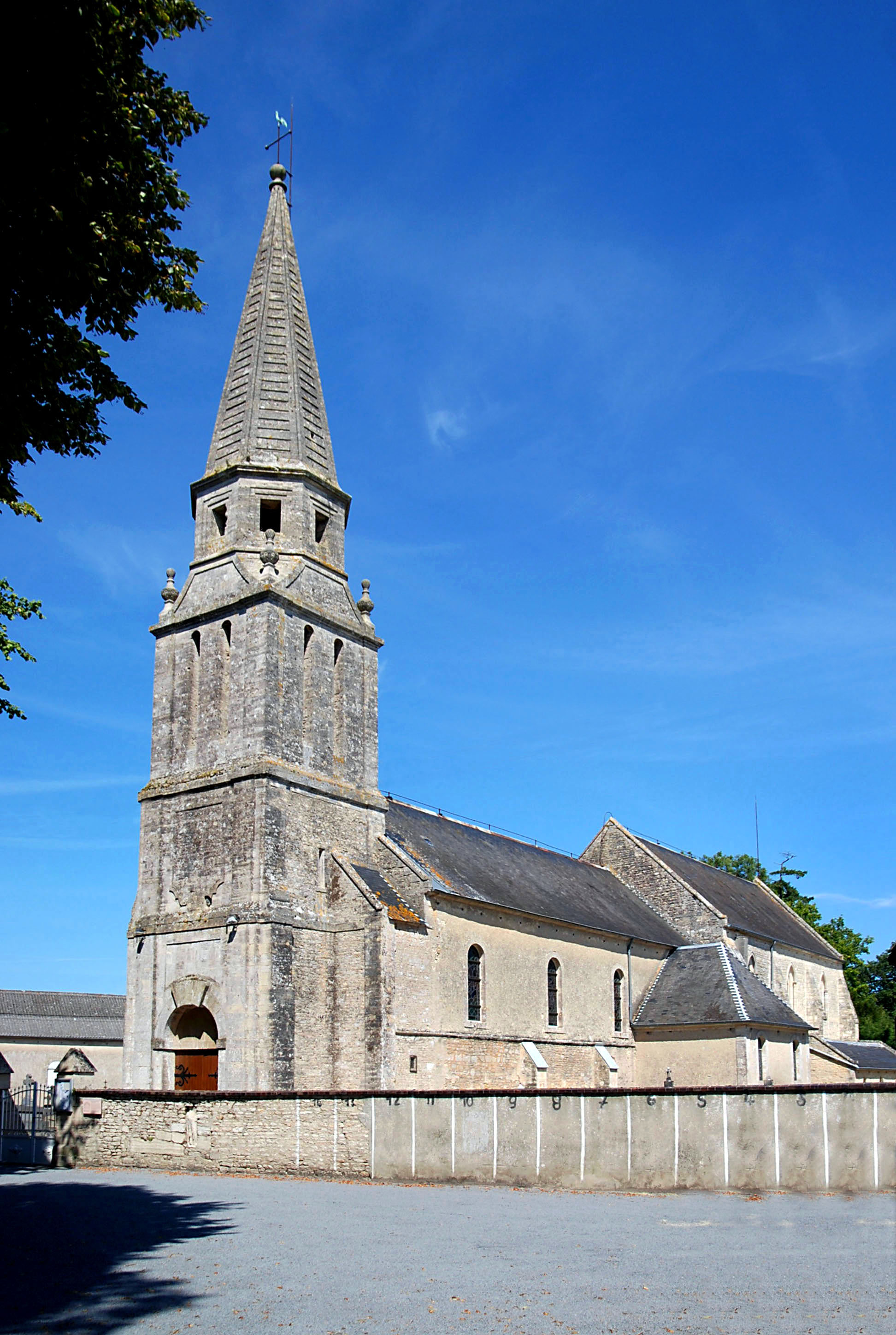 Sommervieu (Calvados)